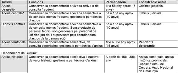 Quadre dels tipus d'arxius judicials de la XAJC